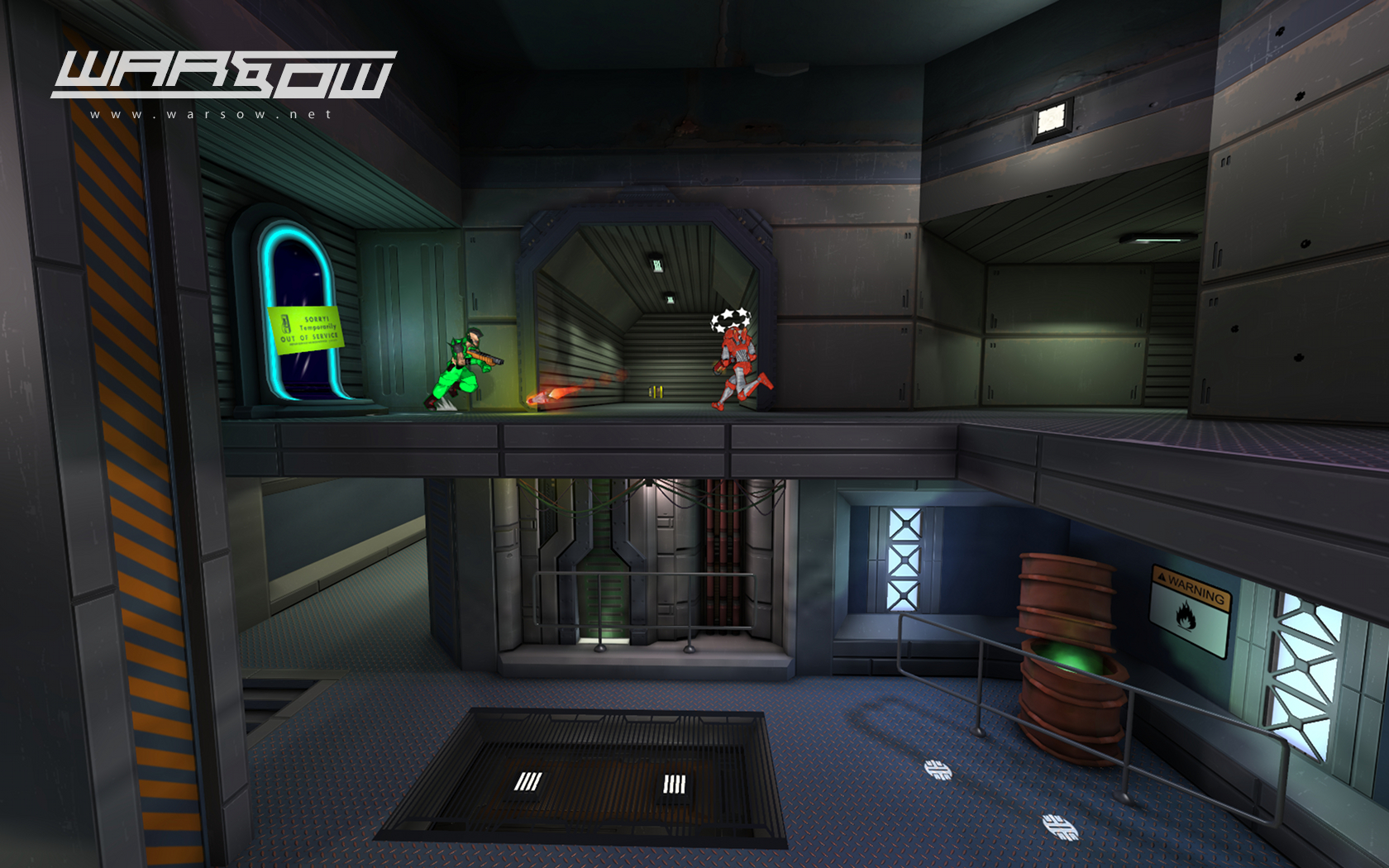 Взято с , по лицензии указанной внизу страницы